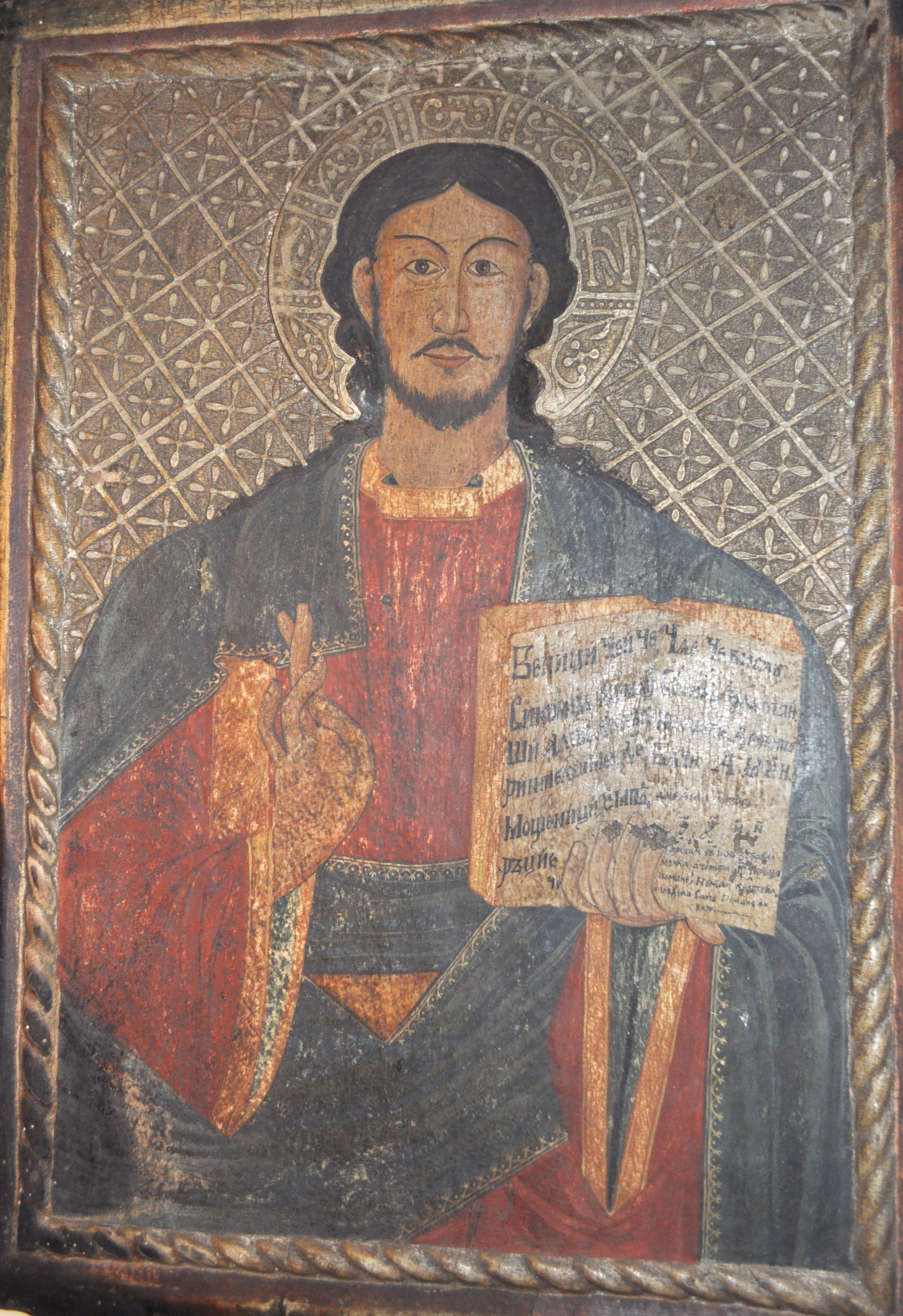 Iisus Pantocrator (Nechita Zugravu-1748) la Biserica de lemn din Dâncu, județul Cluj